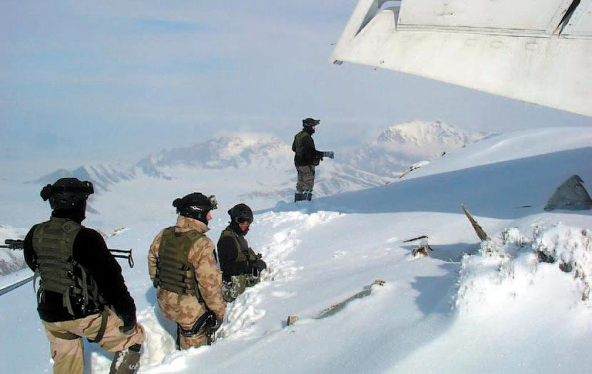 Pripadniki enote za specialno delovanje Slovenske vojske so leta 2005 v okviru delovanja v operaciji v podporo miru ISAF v Afganistanu sodelovali pri iskanju in reševanju posadke in potnikov letala B737 letalske družbe Kam air.